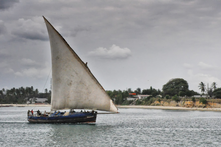 Dar es Salaam, Tanzania